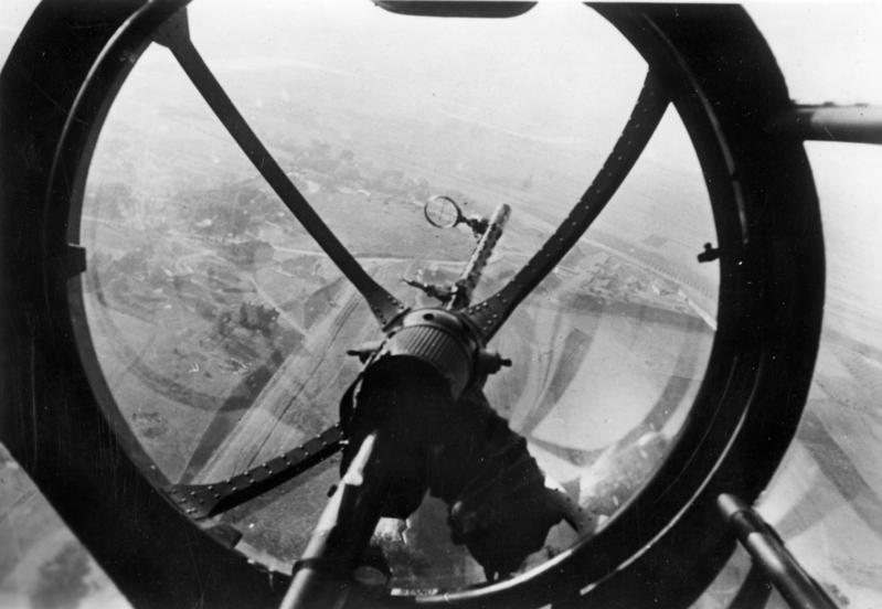 Polen, Blick aus Bugkanzel einer He 111 Deutsches Kampfflugzeug über den Befestigungsanlagen von Brest-Litowsk. Im Hintergrund das silberne Band des Bug, rechts eine der winkligen Sperrforts der Festung. PK-Stempka Scherl Bilderdienst 11576-39L [Polen.- Blick aus der Bugkanzel eines Flugzeugs Heinkel He 111 mit Maschinengewehr auf Brest-Litowsk]